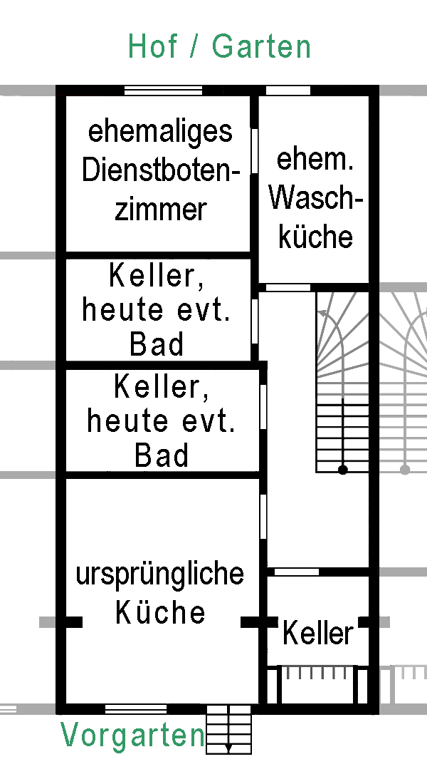 typischer Grundriss eines Bremer Hauses, Souterrain